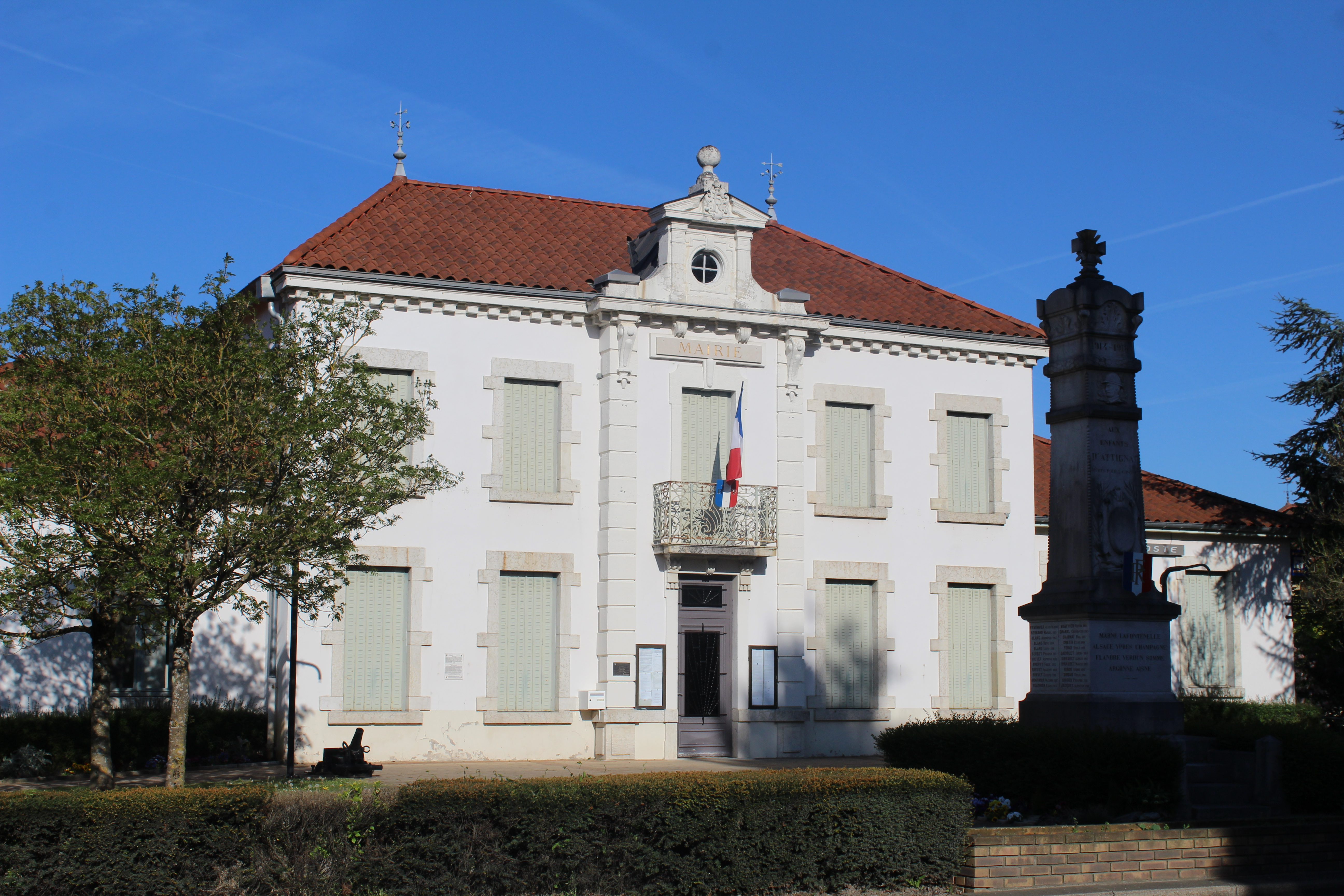 Mairie d'Attignat.